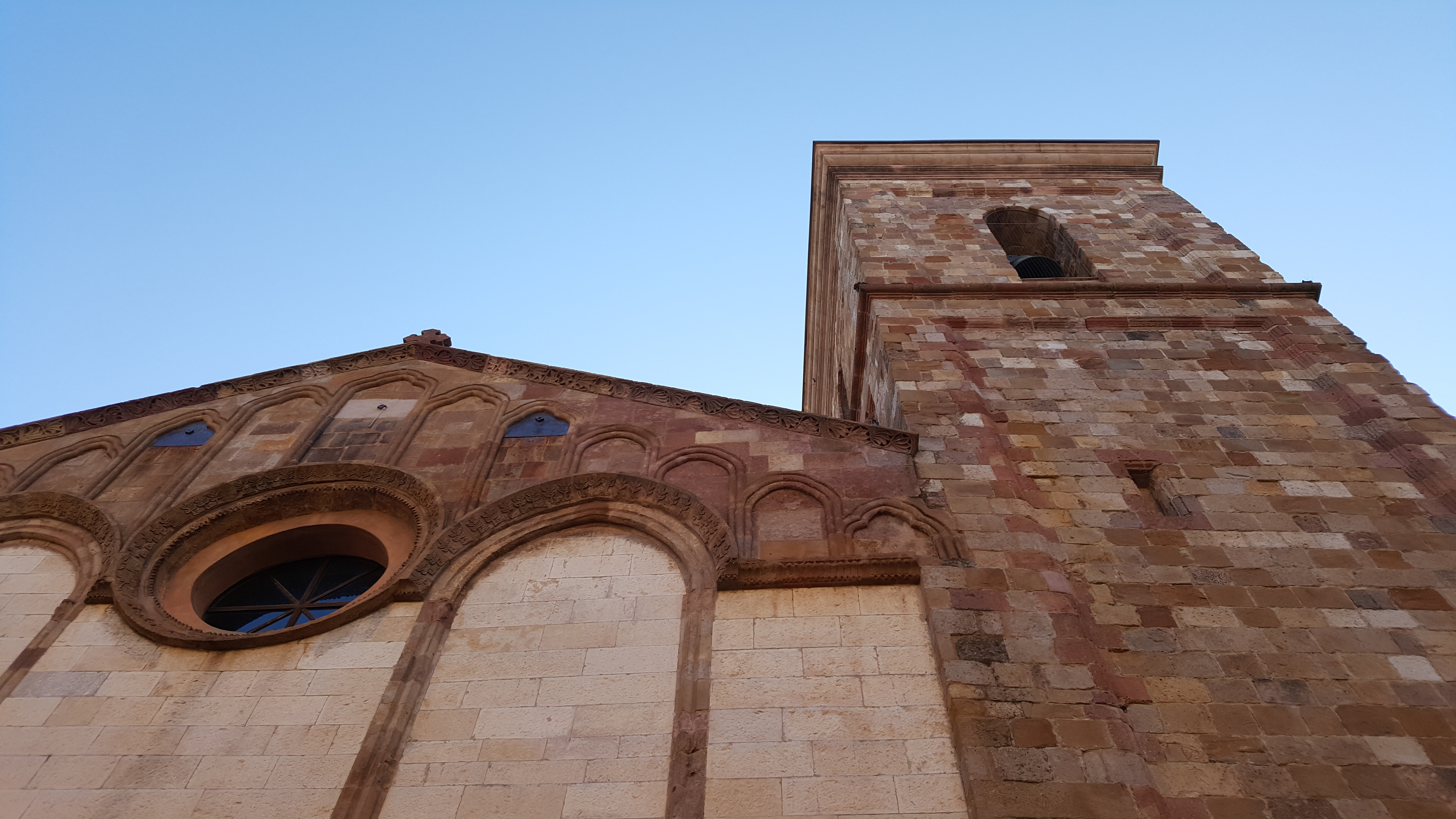 Particolare della facciata e del campanile della Cattedrale di Santa Chiara ad Iglesias. Il campanile, risalente al 1300, ospita una delle campane più antiche della Sardegna, fusa da Andrea Pisano.